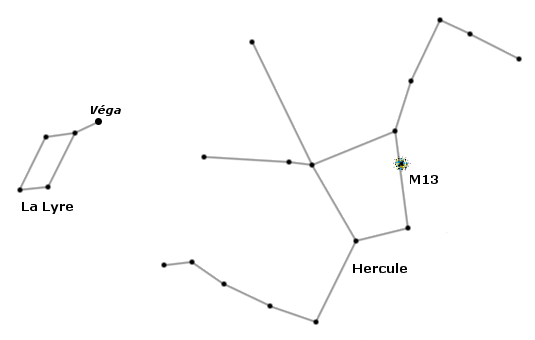 Carte schématique du ciel, permettant de trouver M13